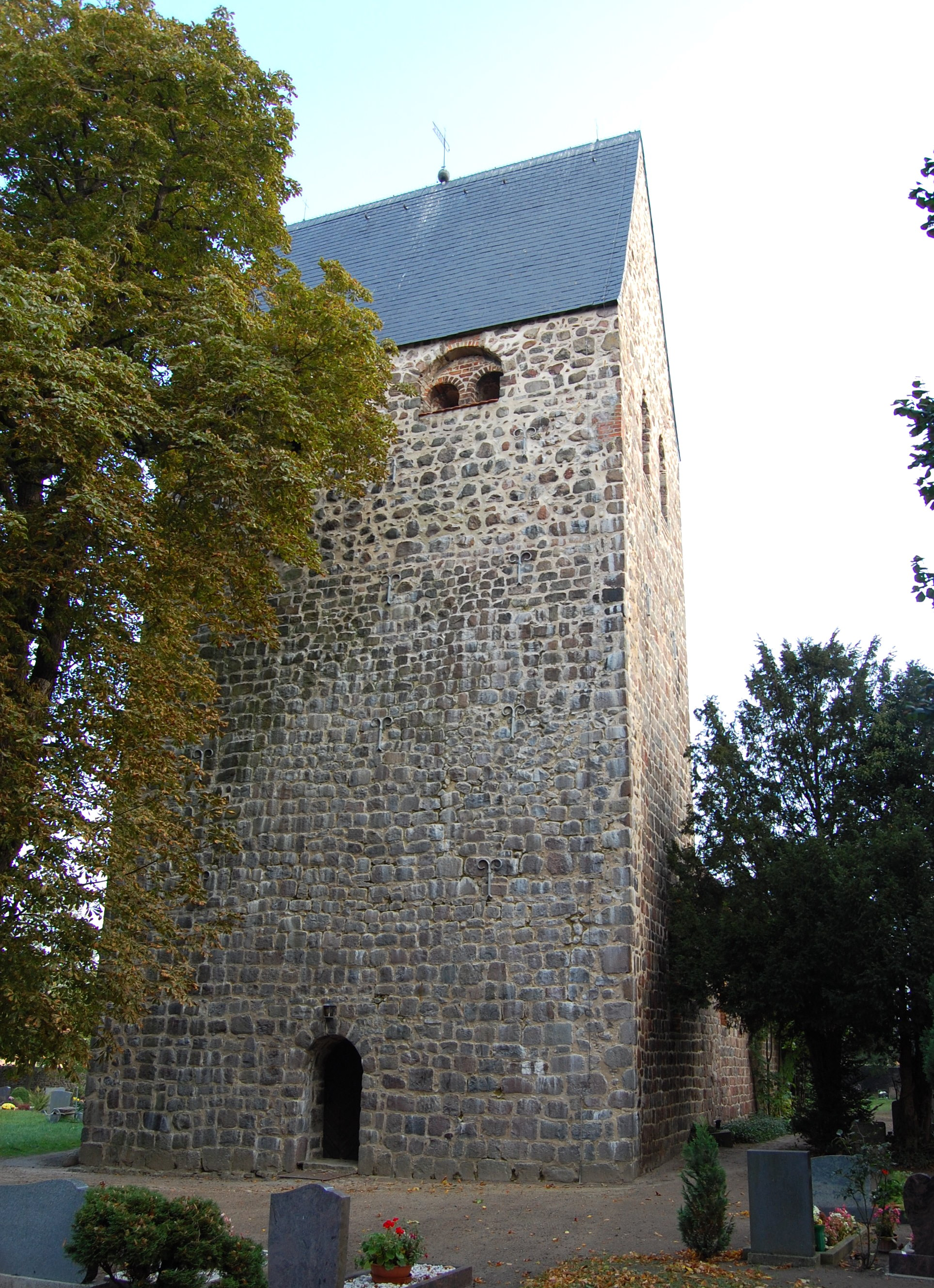 Turm der Dorfkirche Insel